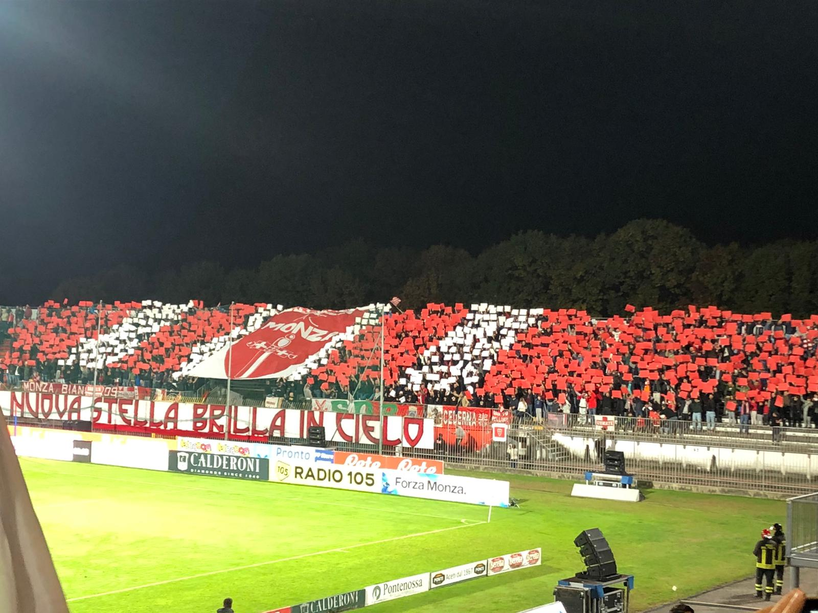 Monza-Renate serie C, coreografia della curva Davide Pieri